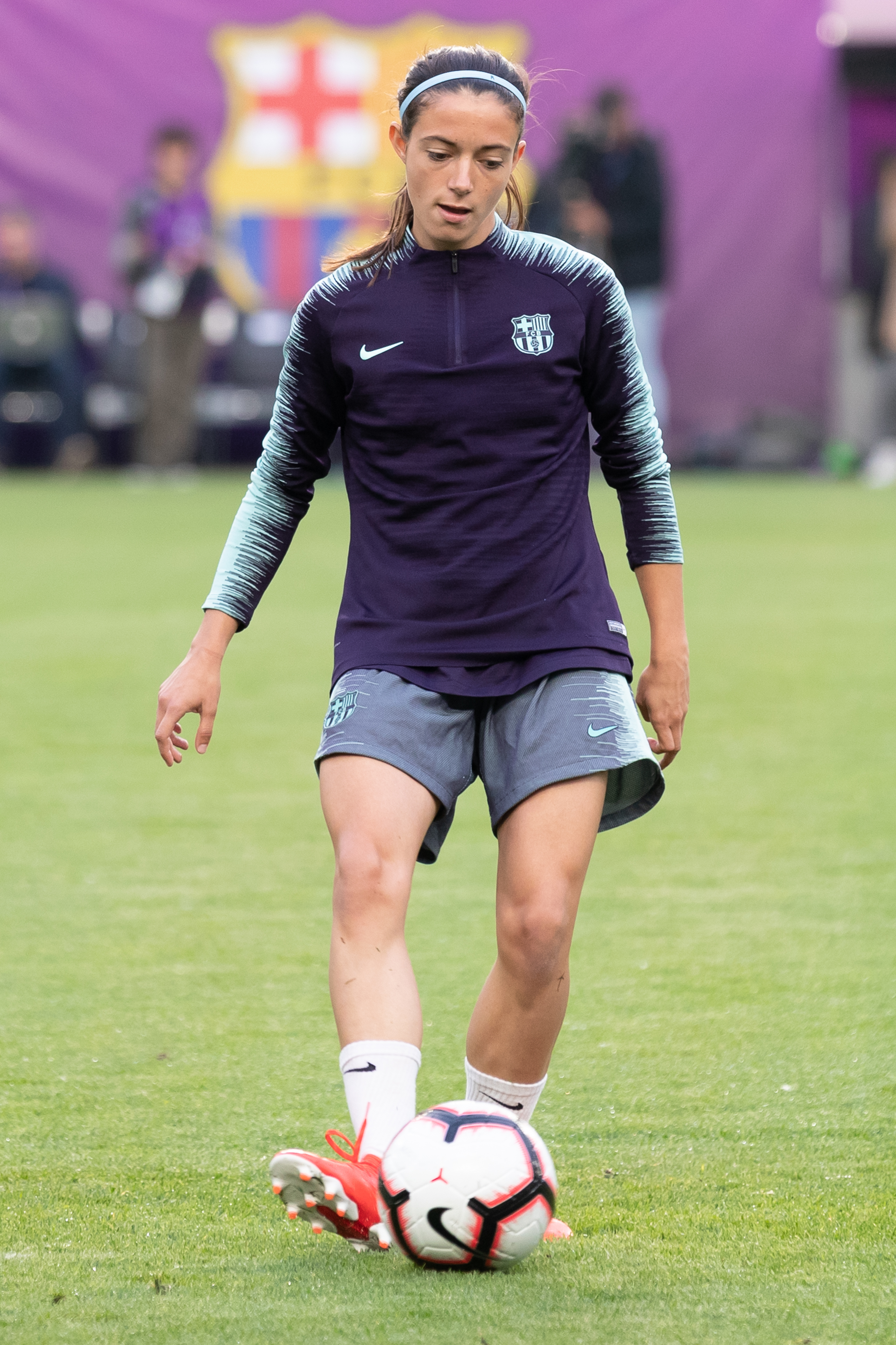 Fußball, Frauen, UEFA Women's Champions League, Olympique Lyonnais - FC Barcelona; Aitana Bonmatí beim Abschlusstraining; Freisteller, Einzelbild